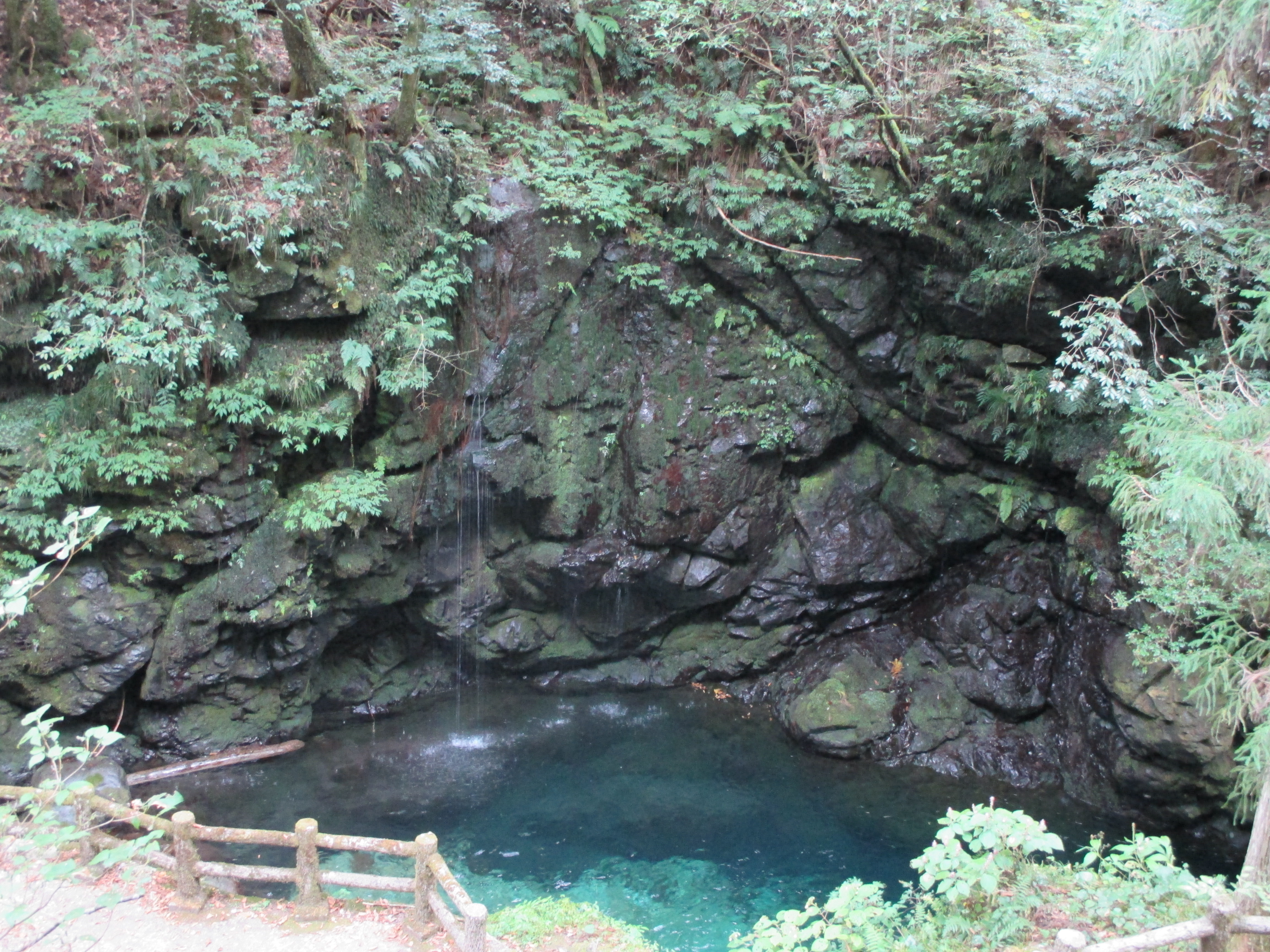 粥川矢納ヶ淵